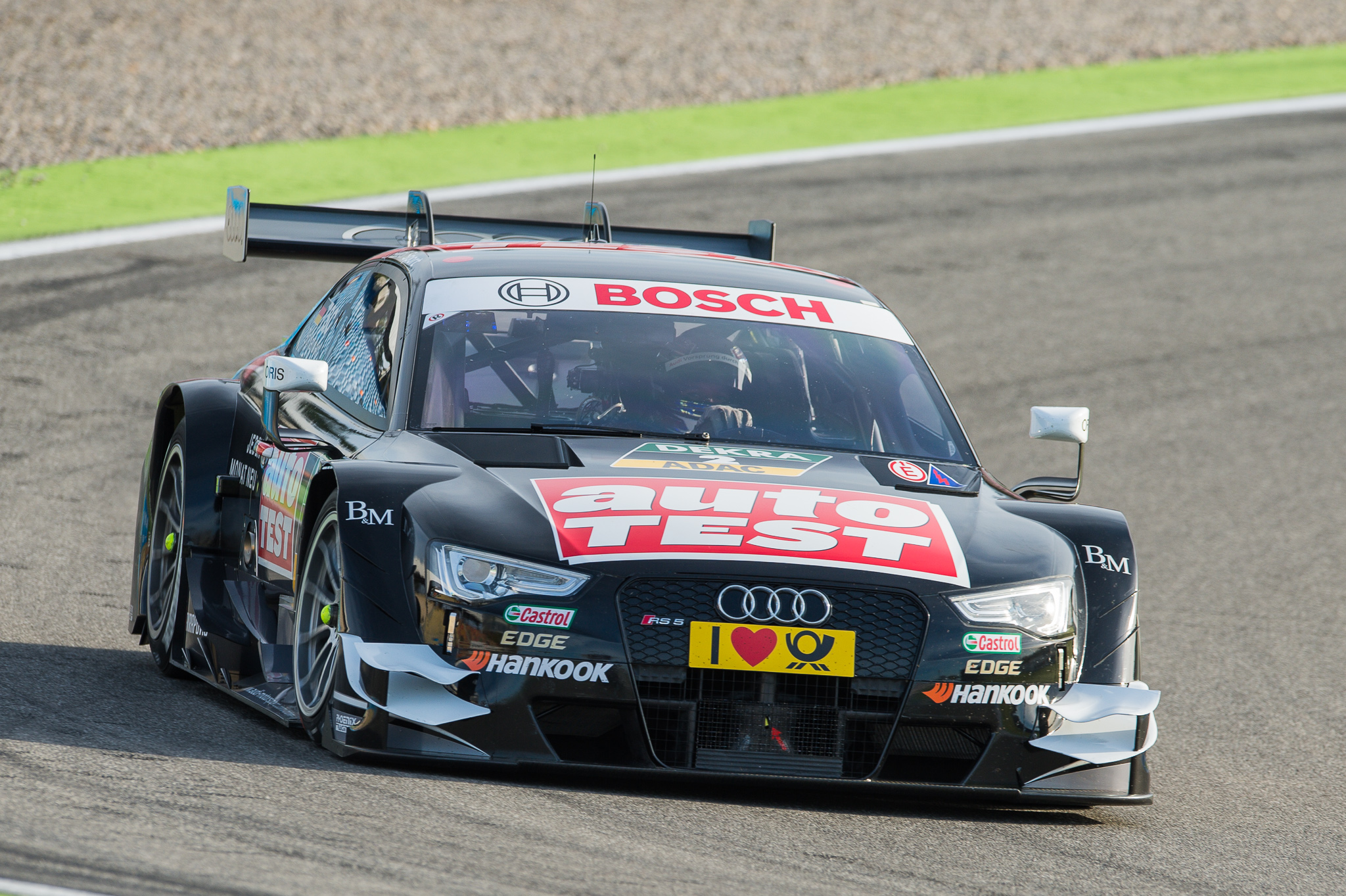 AUTO TEST Audi RS 5 DTM,DTM,Deutsche Tourenwagen Masters,Hockenheimring,Motorsport,Phoenix Racing GmbH,Timo Scheider